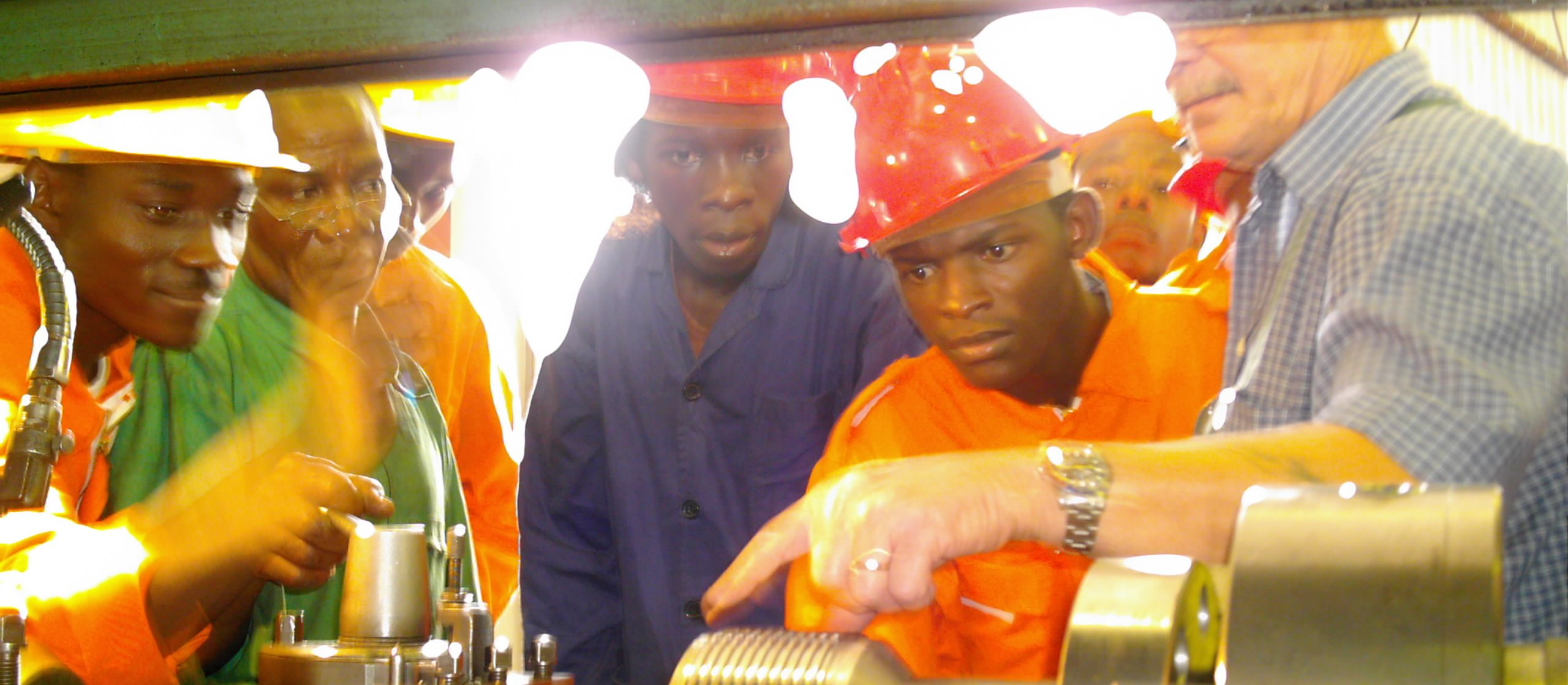 en atelier